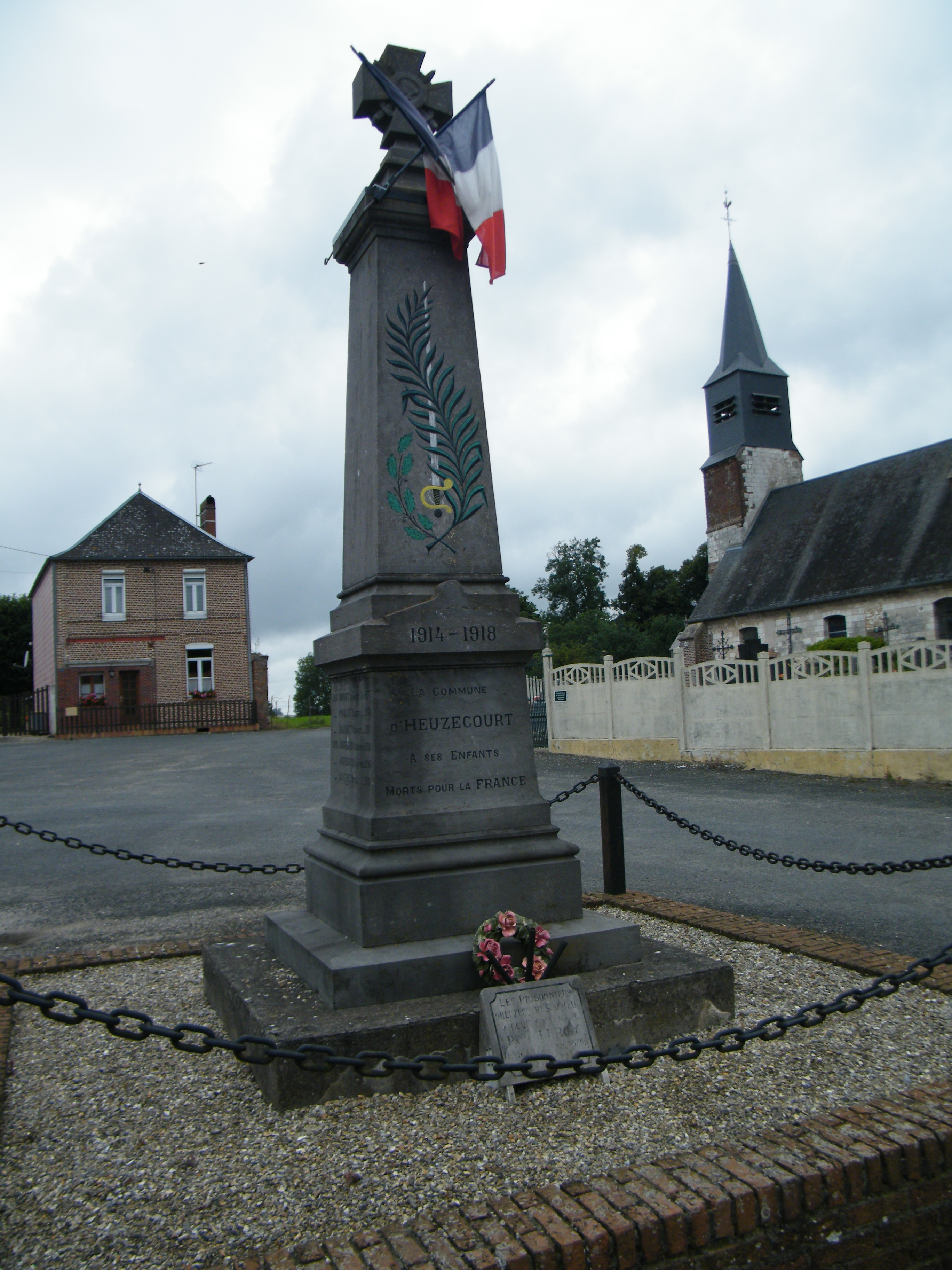 Monument aux morts pour la patrie d'Heuzecourt, Somme, France.